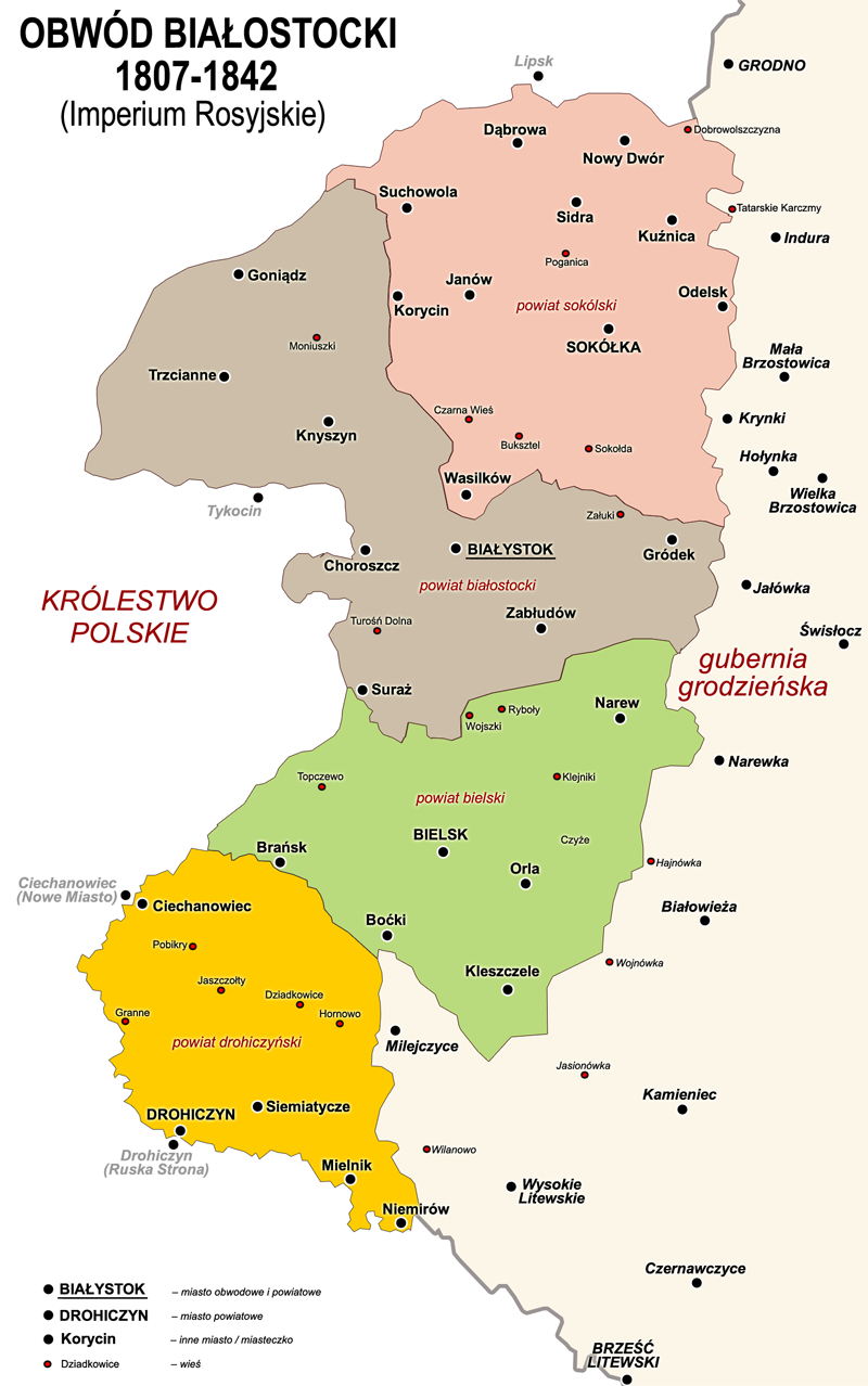 Polska: Mapa administracyjna obwodu białostockiego, 1807-1842 (Administrative map of Belostok Oblast 1807-1842)